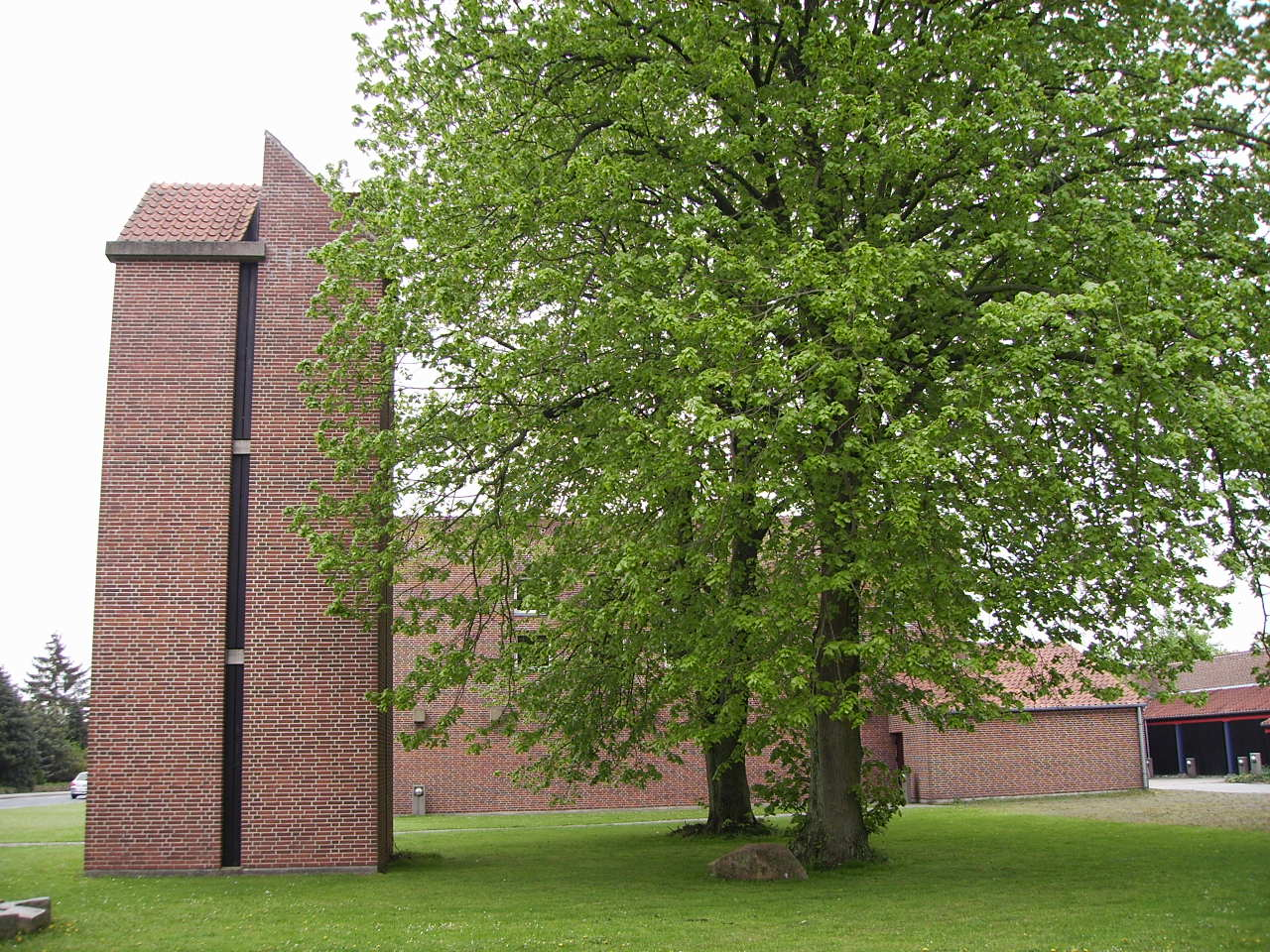 Hjallese Kirke, Hjallese Sogn, Odense Herred, Odense Amt, Denmark (Danish Church) Date: 17.05.2006 Photographed by Søren Møller